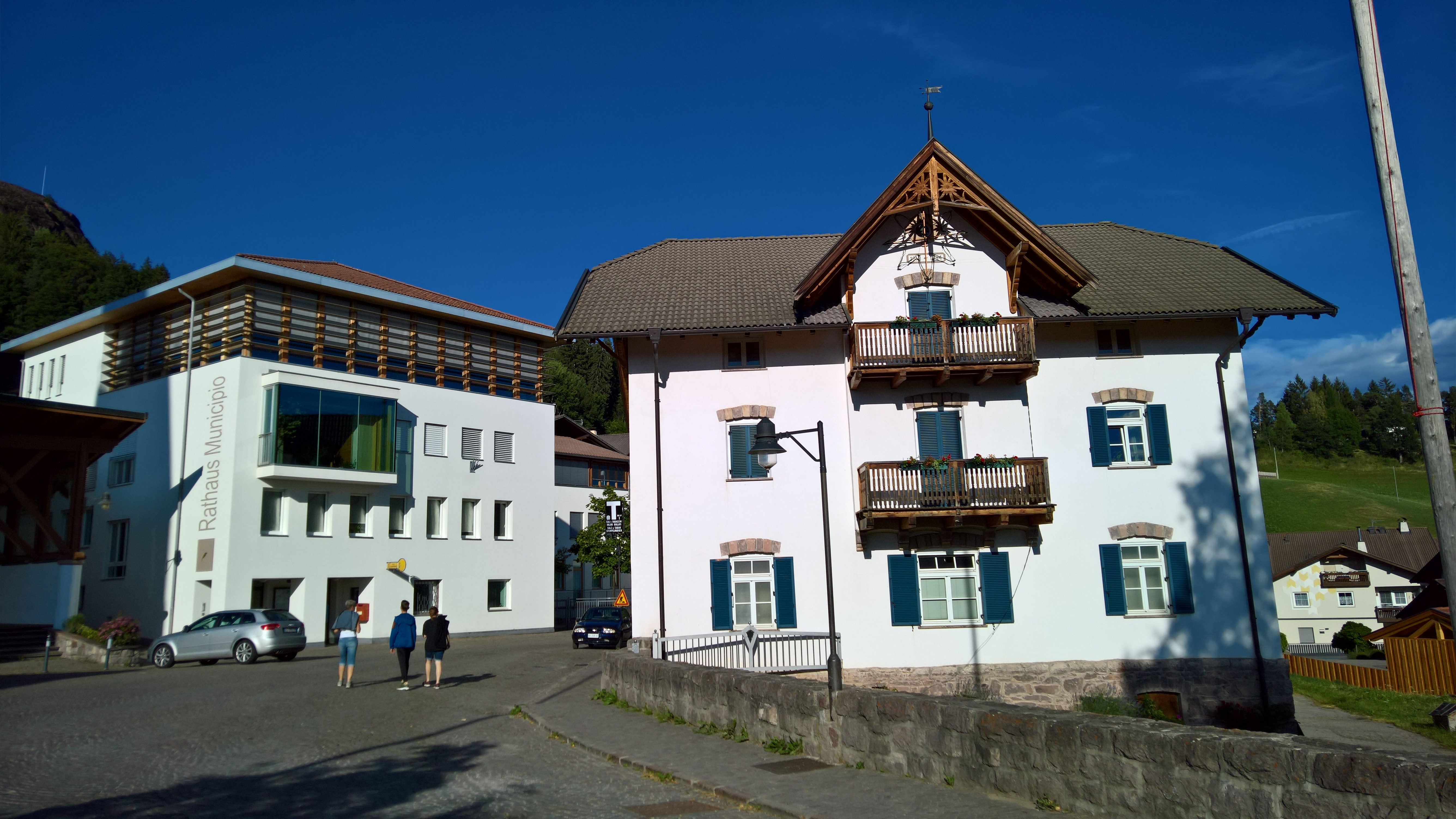 Rathaus und Gebäude mit Supermarkt am zentralen Platz von Vöran